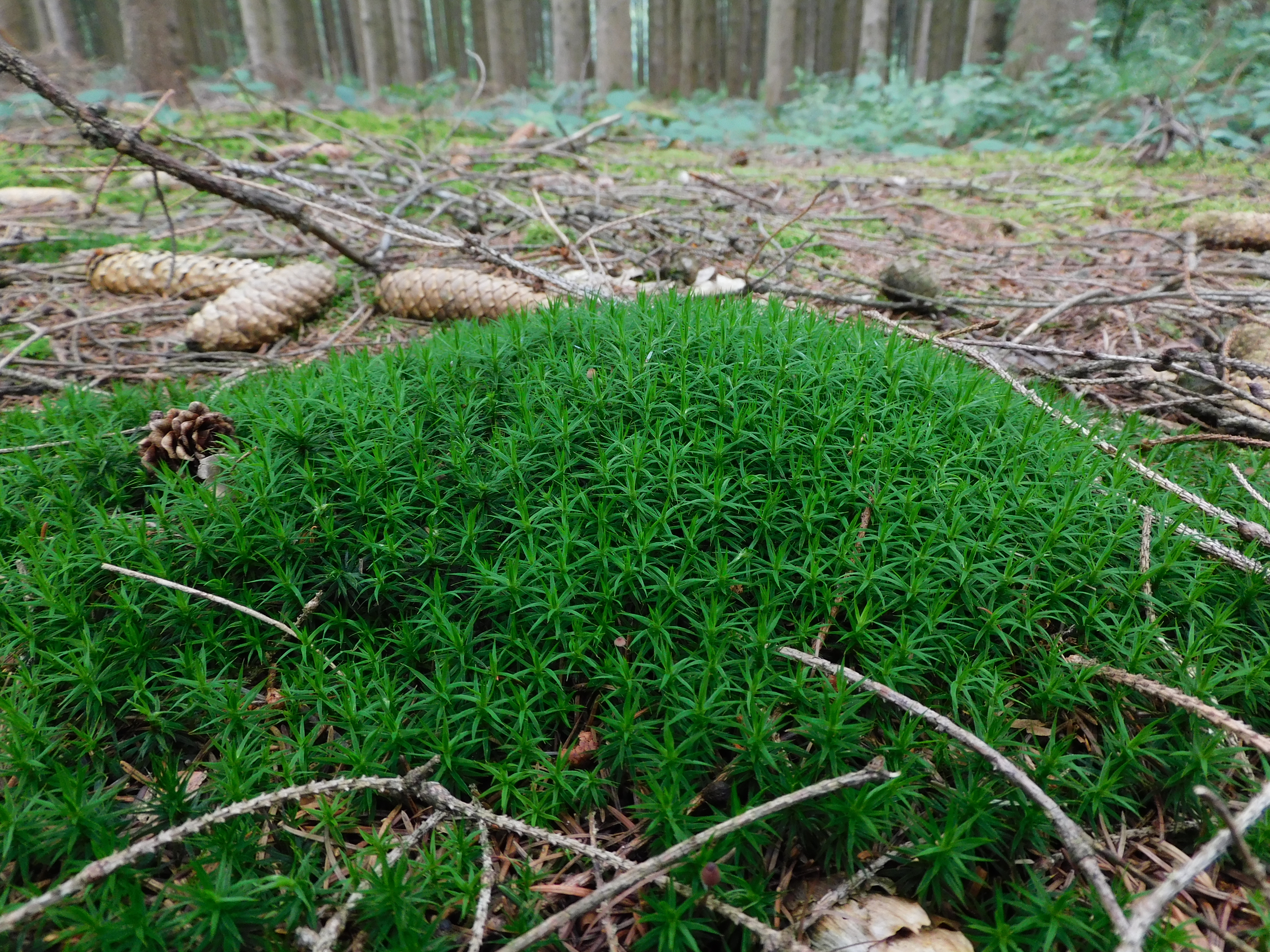 Typisches Polster von Polytrichum formosum in einem Forst in Bayern.